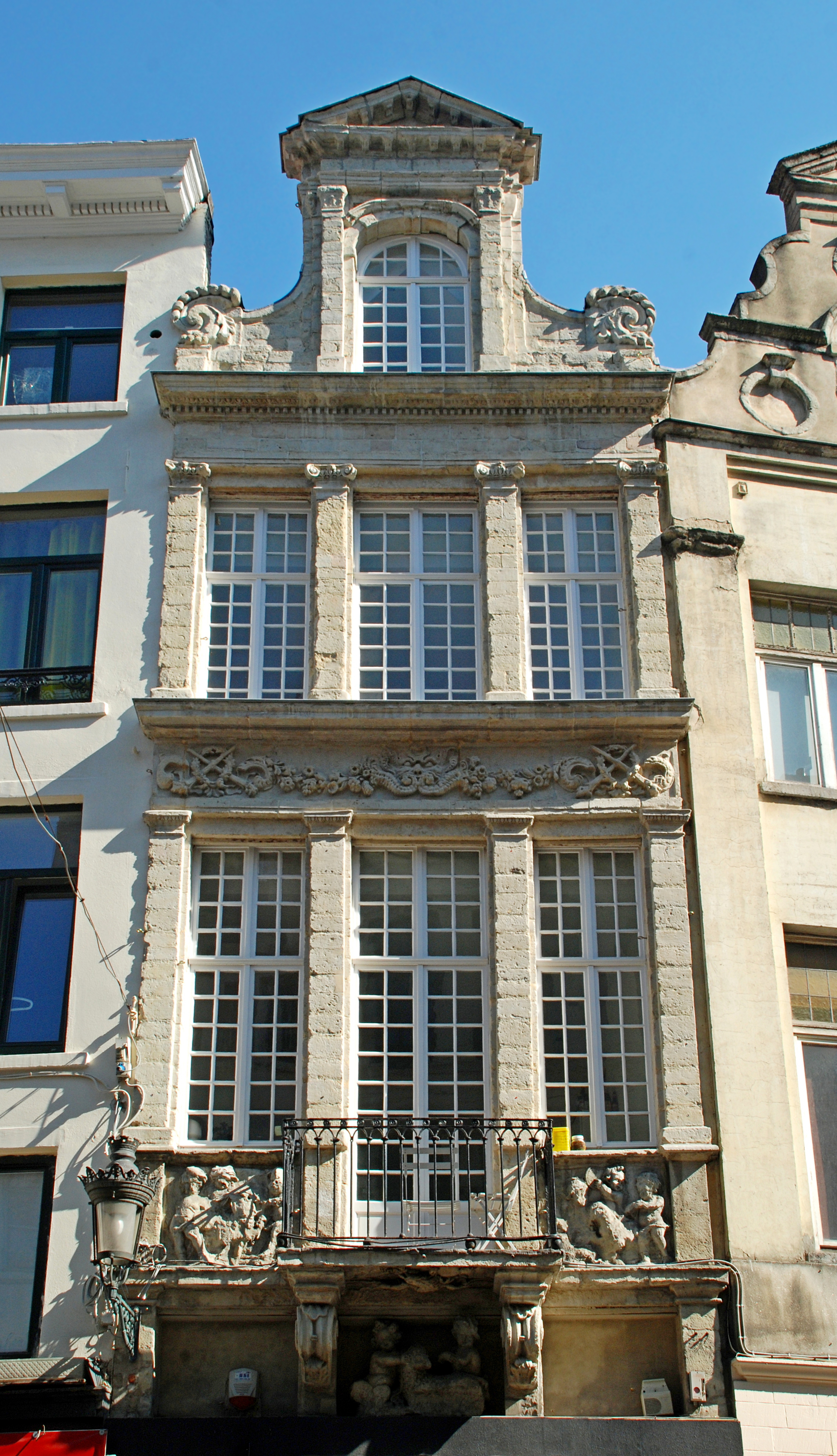 Belgique - Bruxelles - Maison de l'Agneau Blanc